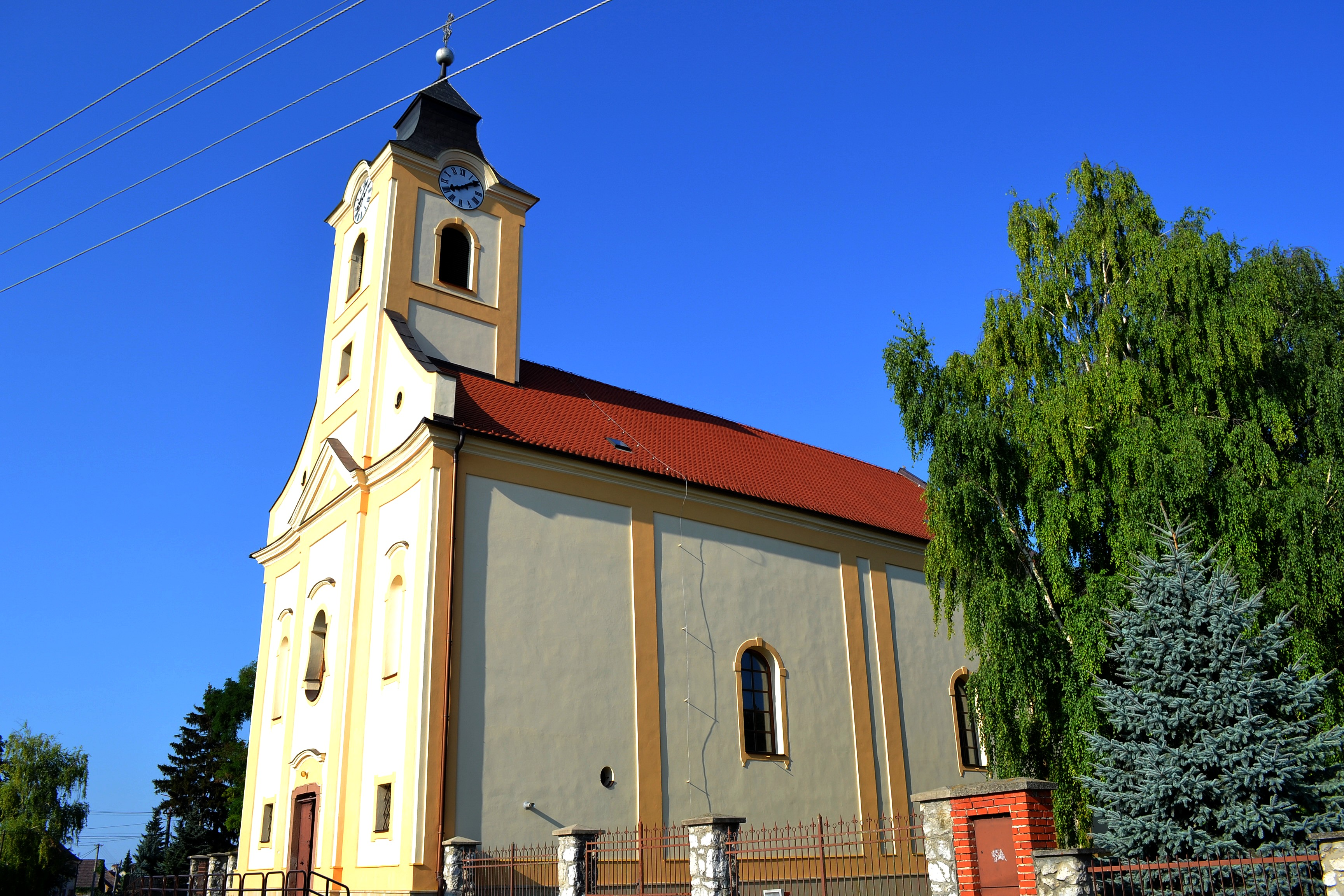 Brestovany (okr. Trnava), Kostol svätého Jána Krstiteľa; celkový pohľad od severu